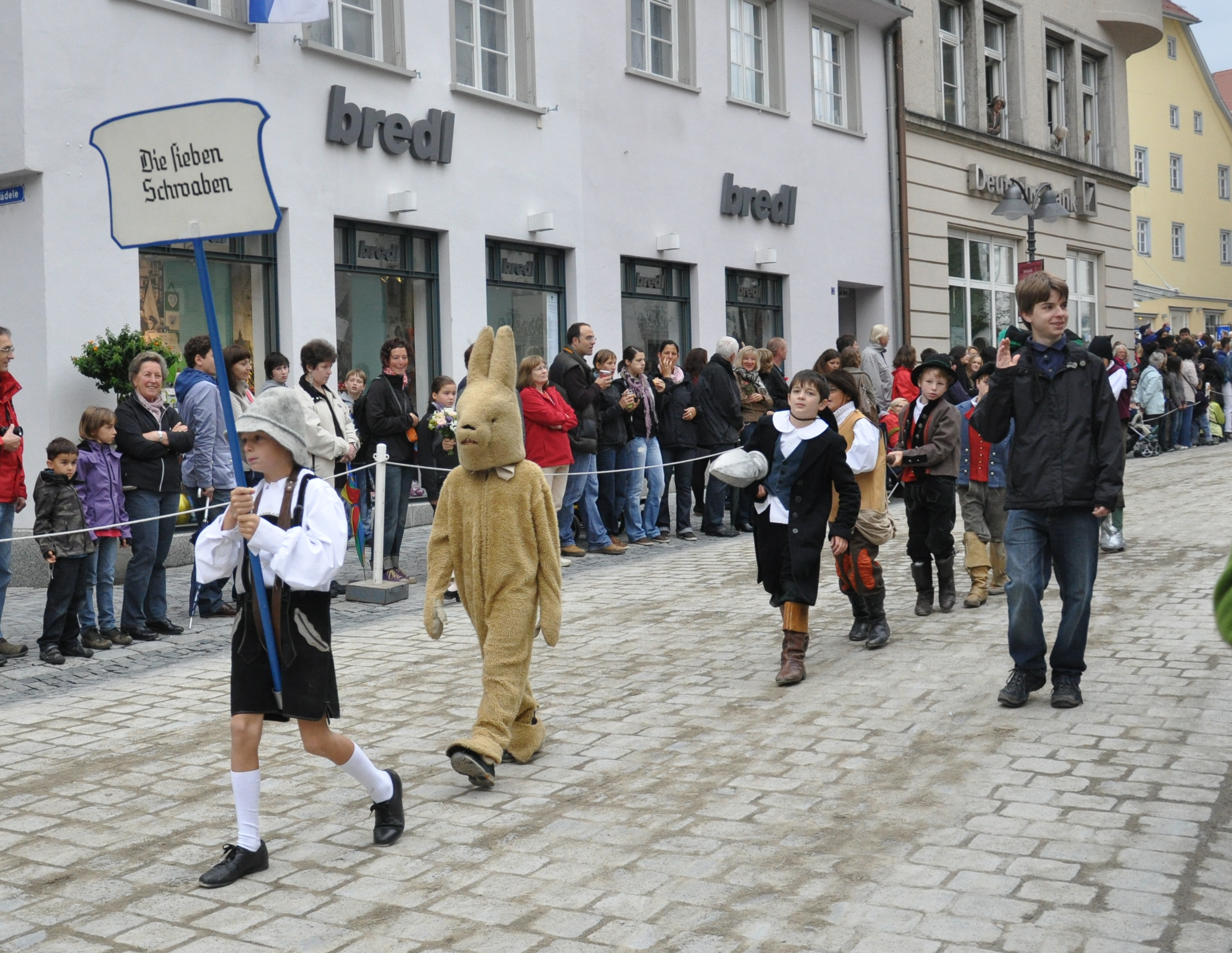 Rutenfest Ravensburg 2011, Festzug am Rutenmontag Die Sieben Schwaben